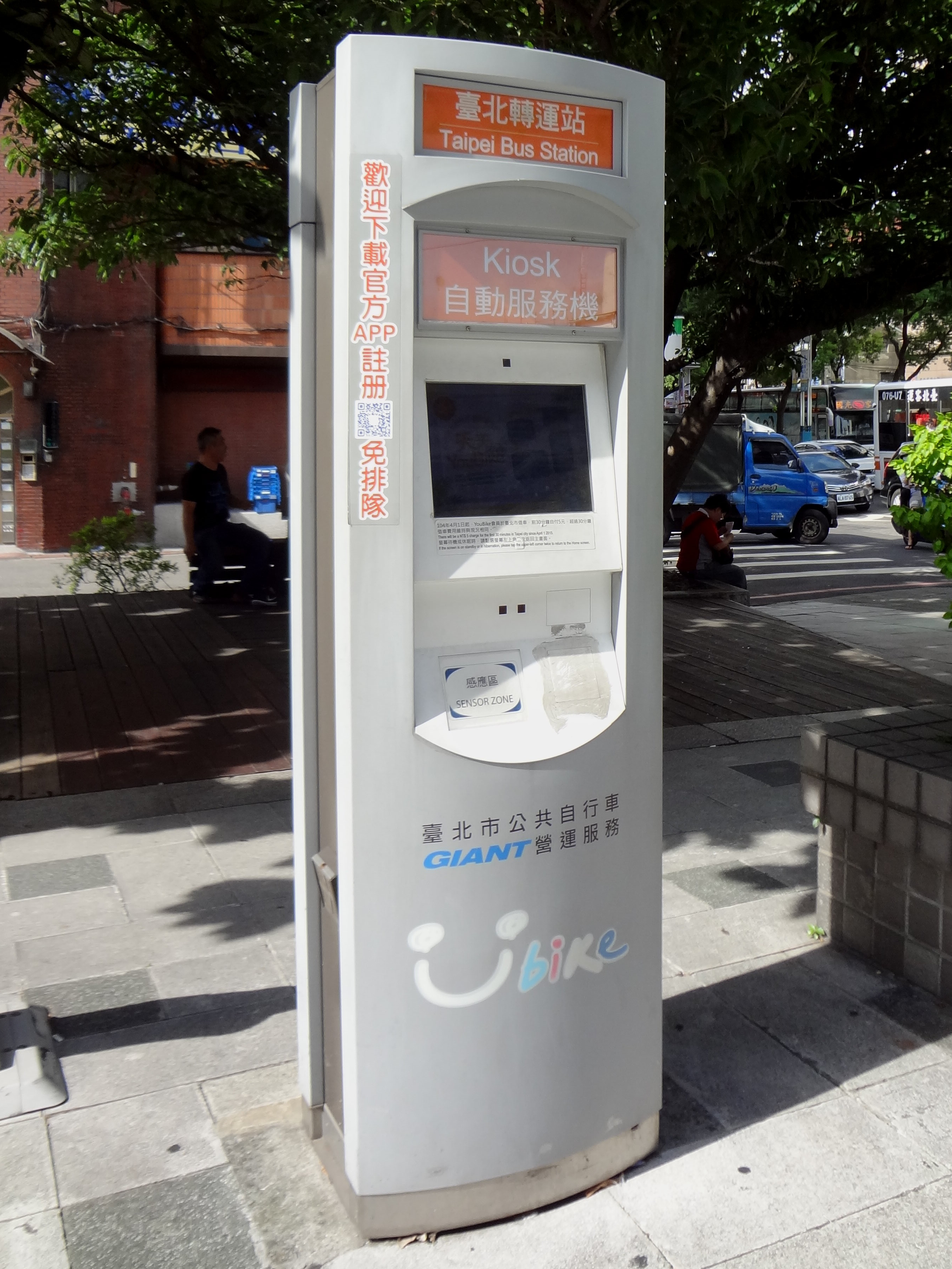 臺北市公共自行車租賃系統臺北轉運站自動服務機。